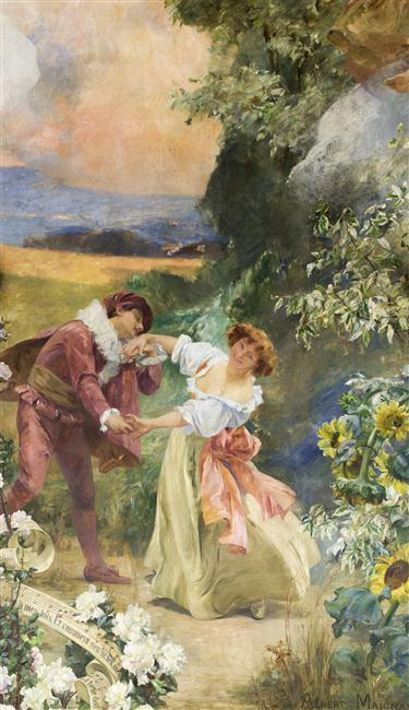 Détail des fresques du Foyer de l'Opéra Comique décrivant une scène de Zampa.